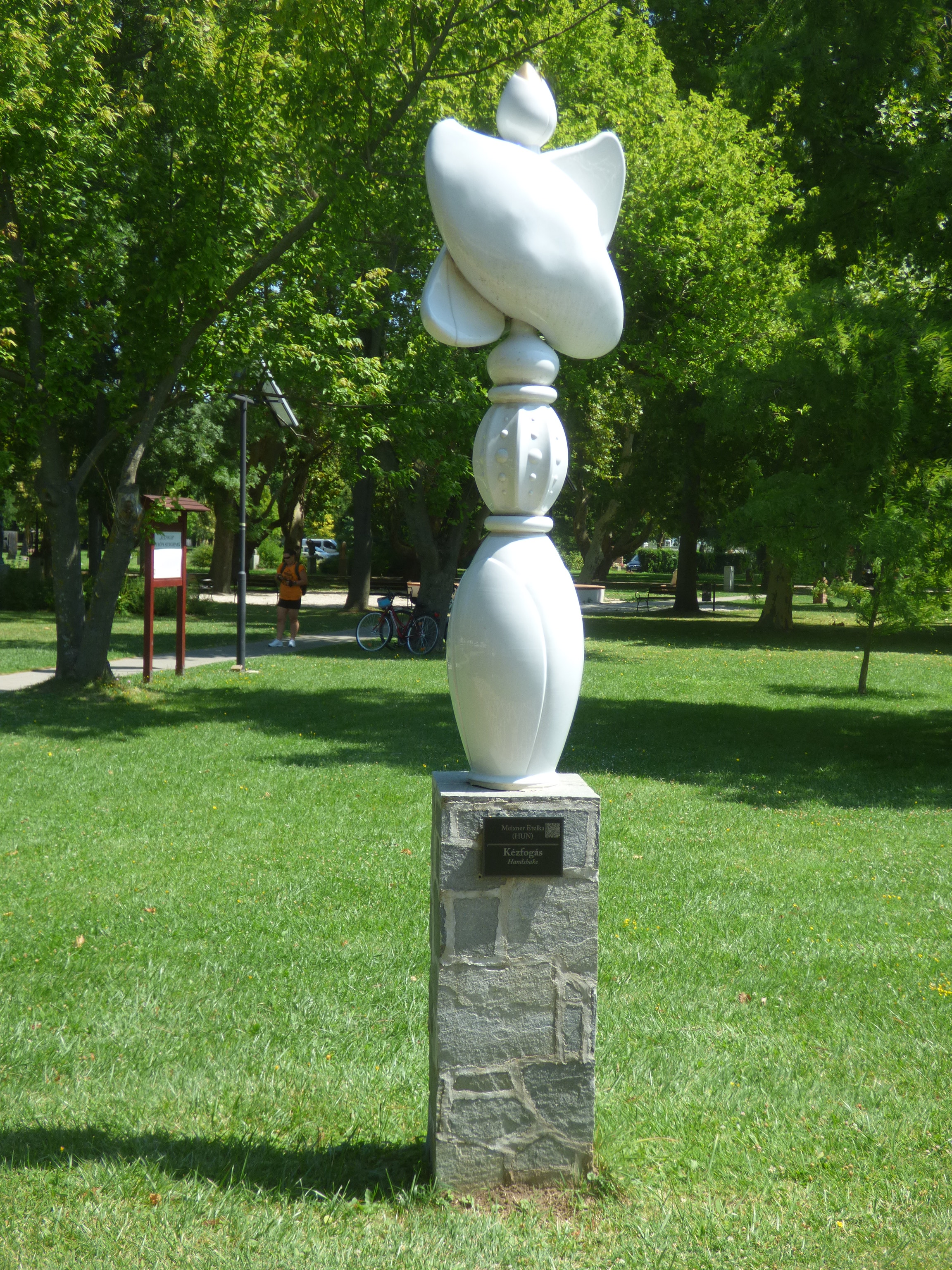 Meixner Etelka Kézfogás című szobra a balatonalmádi szoborparkban